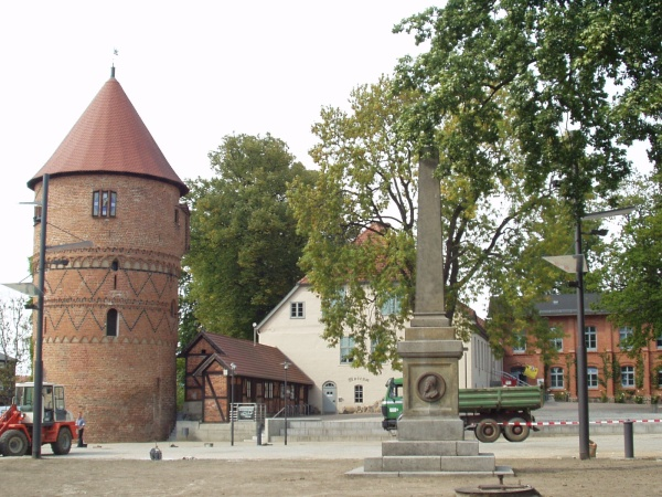 Amtsturm und Museum im Lübzer Stadtkern